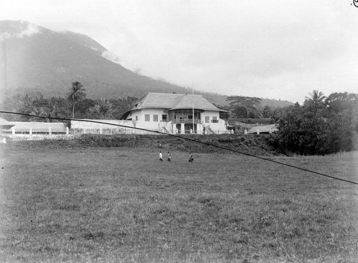 Negatief. Foto is genomen tijdens de Wichmann Expeditie naar Noord Nieuw-Guinea. Het paleis van de sultan van Ternate